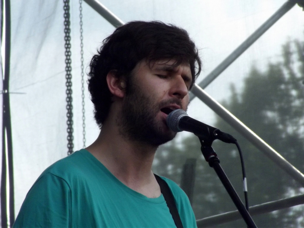 Zdjęcie zrobione podczas OFF Festival 2012 w Katowicach.